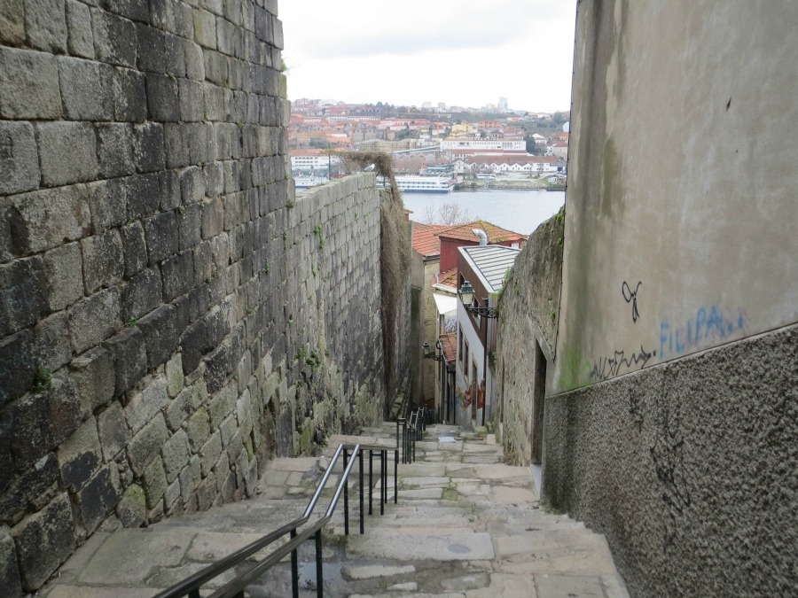 Porto walk 2